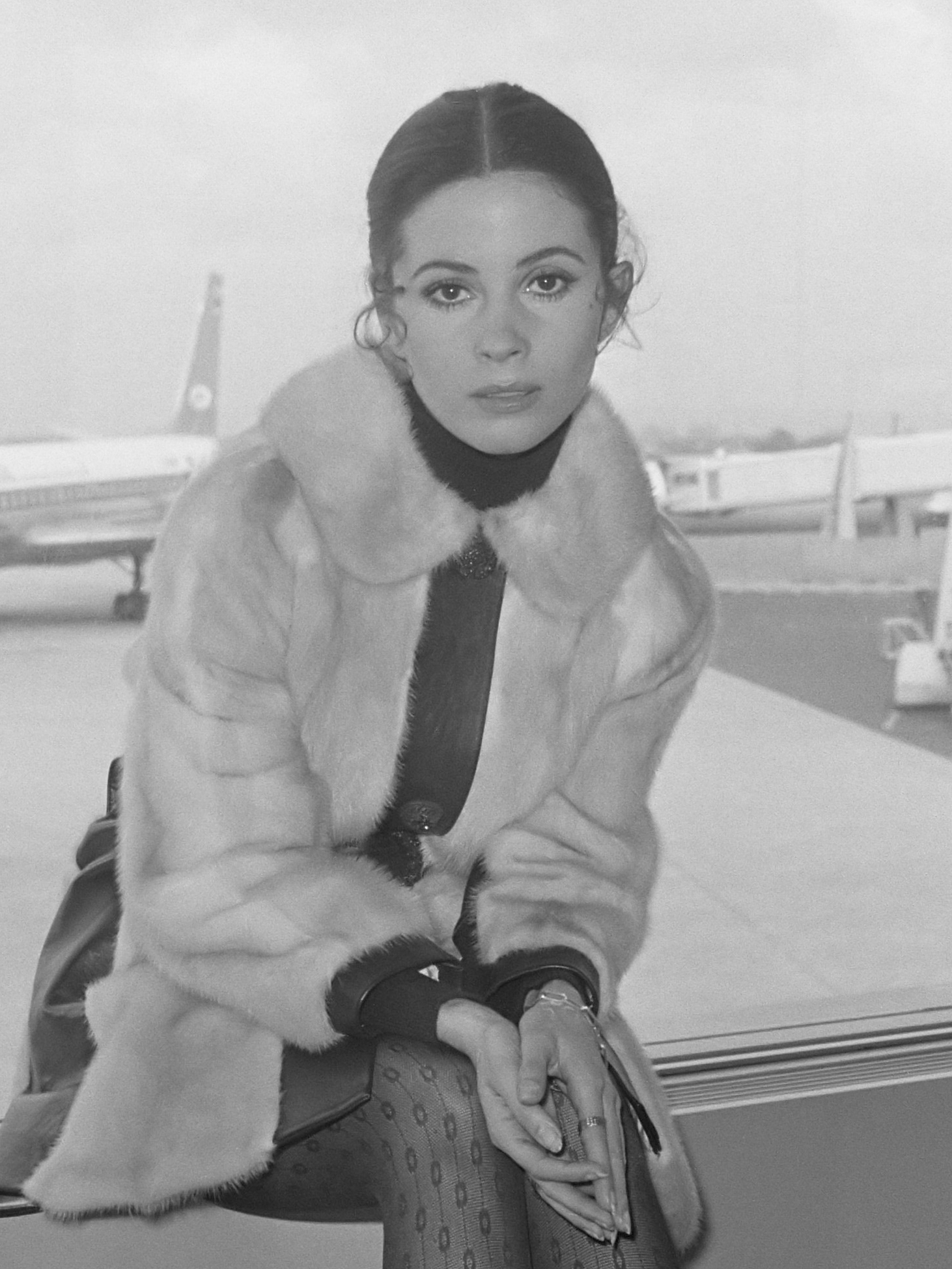 Filmopnamen op Schiphol met Barbara Parkins voor film "Puppet on chain". Barbara Parkins met vliegtuig op de achtergrond